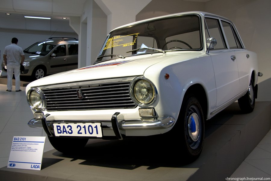 ВАЗ-2101, первый автомобиль, выпущенный заводом АвтоВАЗ. Музей ОАО "АВТОВАЗ", Тольятти, Россия